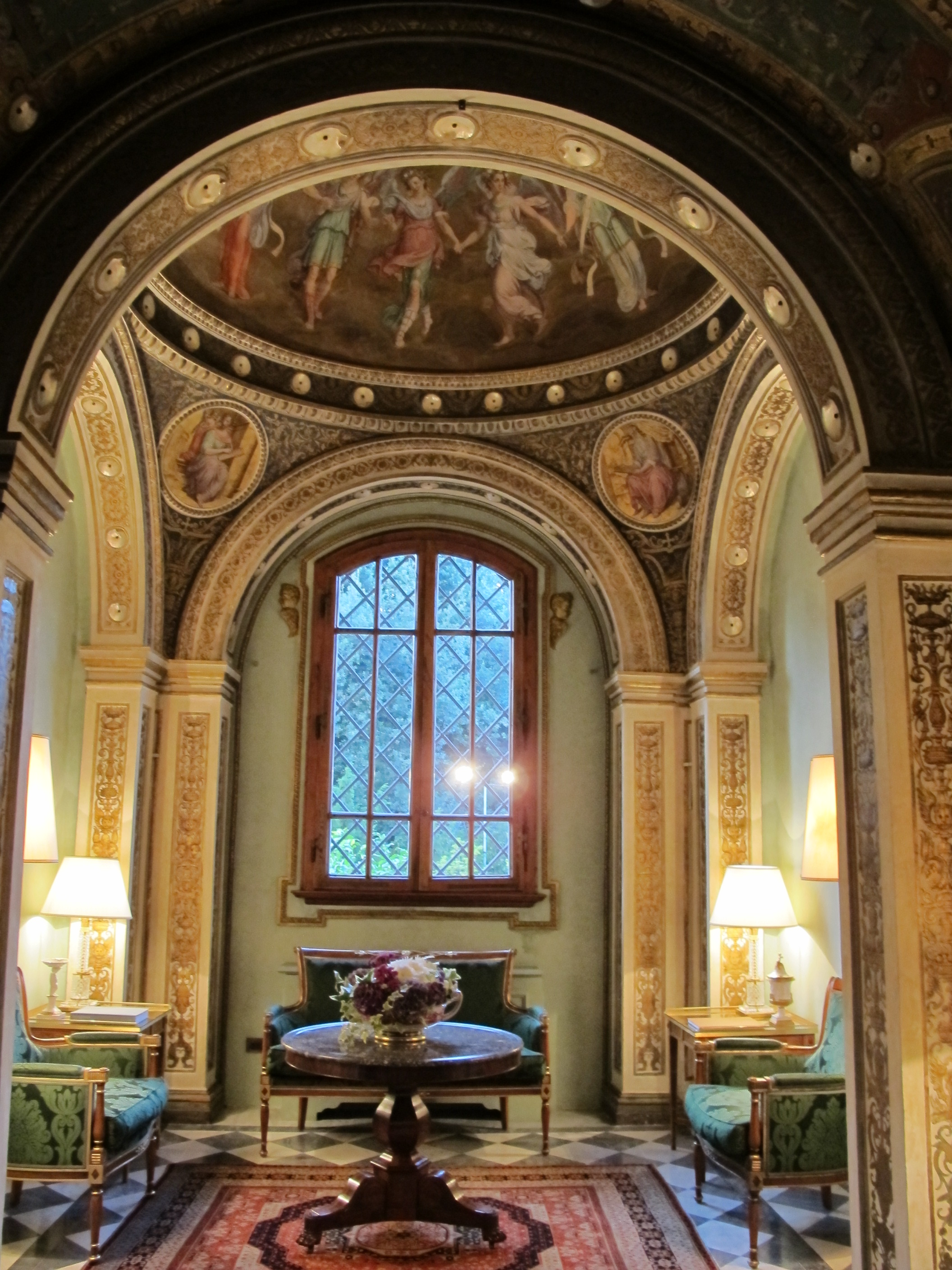 Cappellina del cardinale